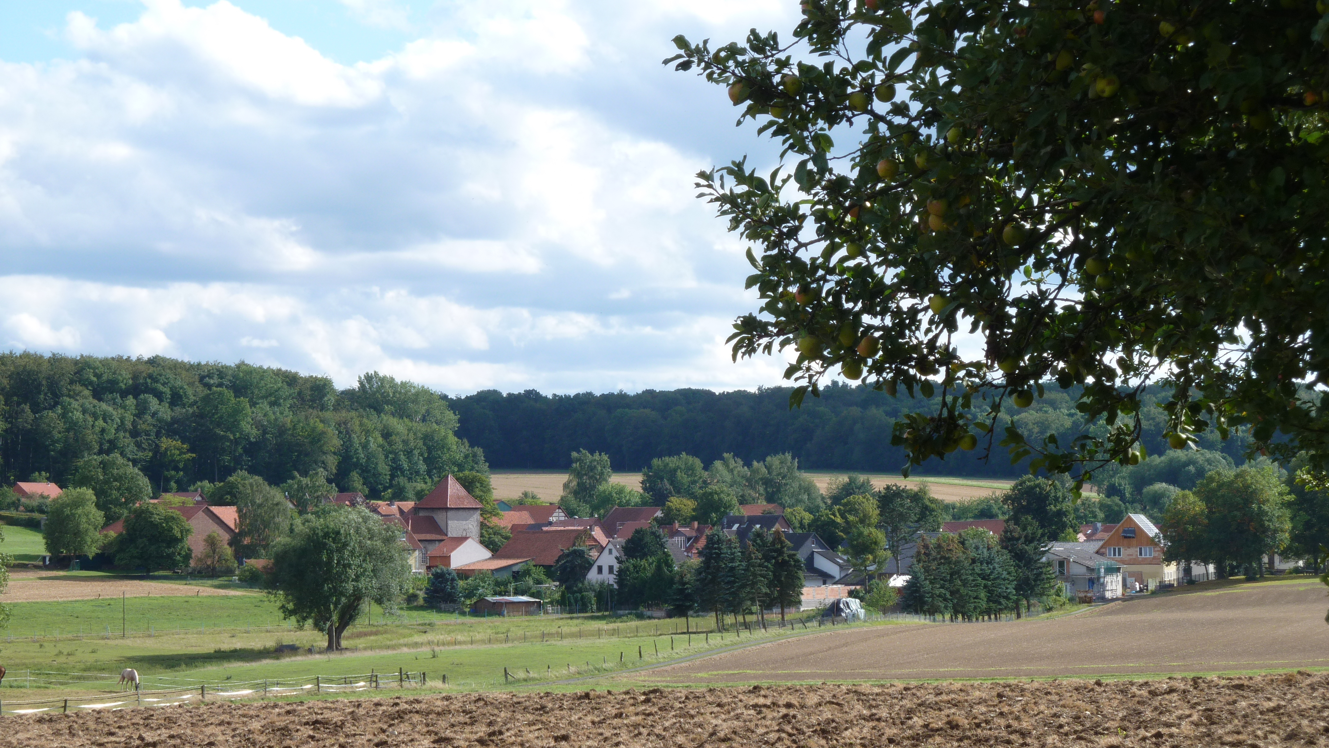 Blick von Nordosten auf Knutbühren, Stadt Göttingen, Südniedersachsen (Deutschland).